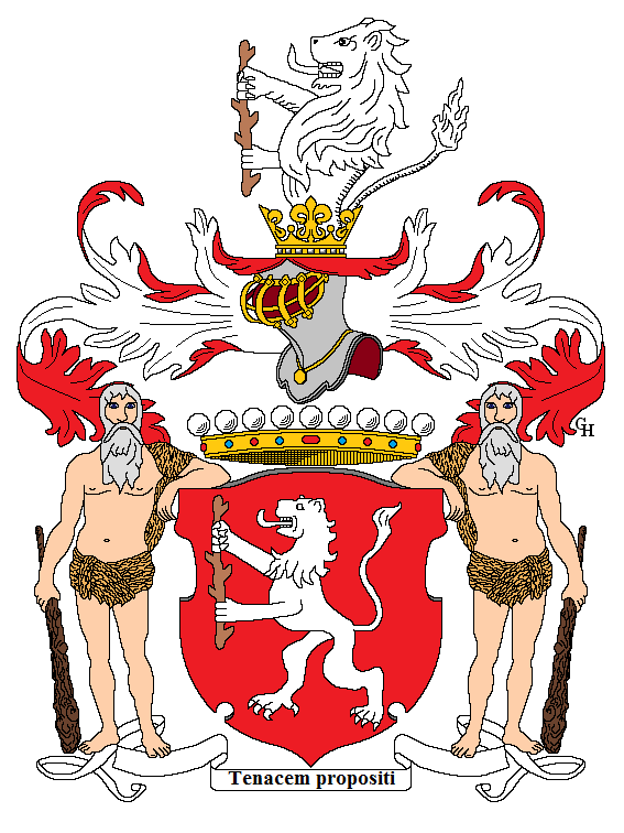 Wappen des österreichischen Diplomaten Alexander Freiherrn von Hübner (1811–1892), verliehen anlässlich seiner Erhebung in den österreichischen Grafenstand 1888. Zeichnung von Gerd Hruška ( Für weitere Informationen zu dieser Standeserhebung siehe (